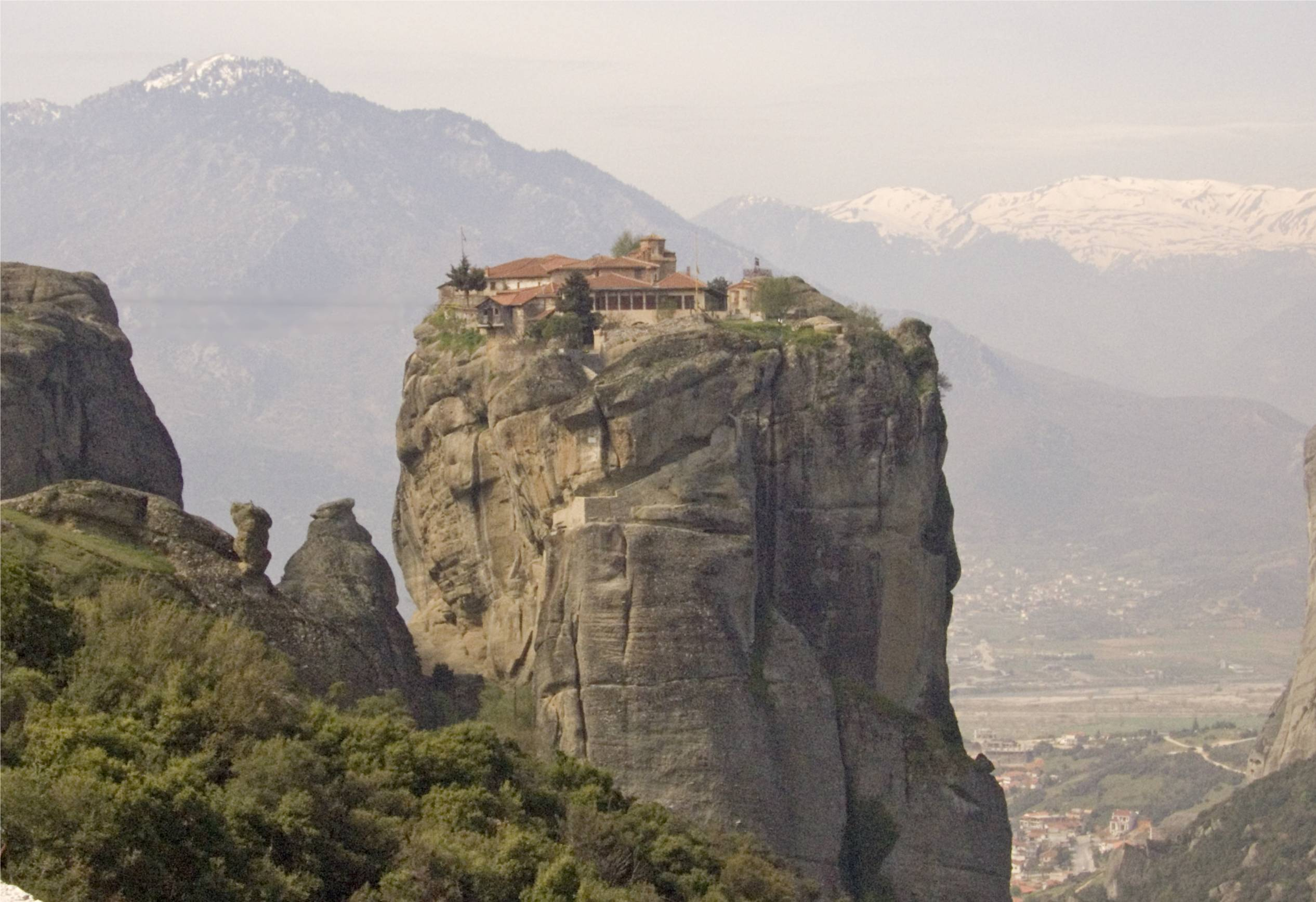 Foto Sofie Debognies April 2005